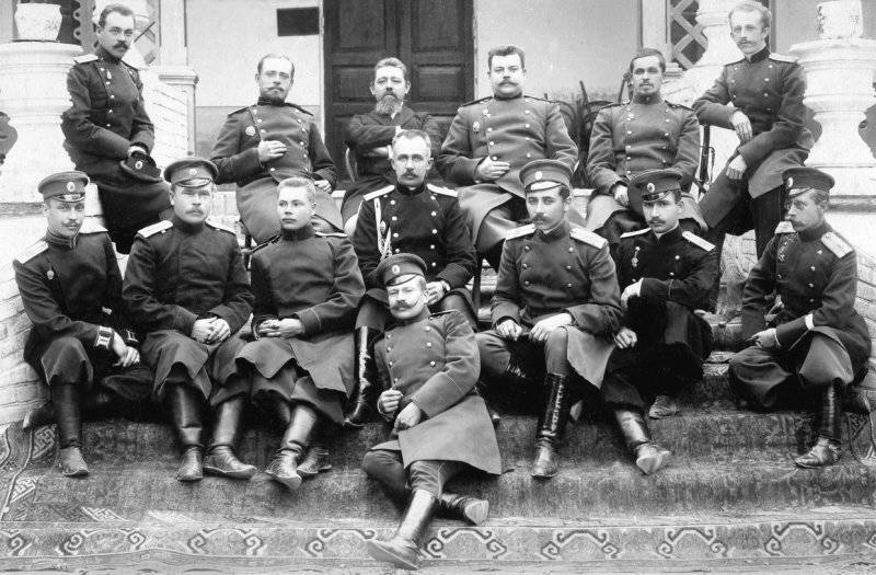 Штабс-капитан Снесарев Андрей Евгеньевич (центр, 2ряд) с сослуживцами по время службы в Туркестанском ВО. Примерно 1901-1903 гг.